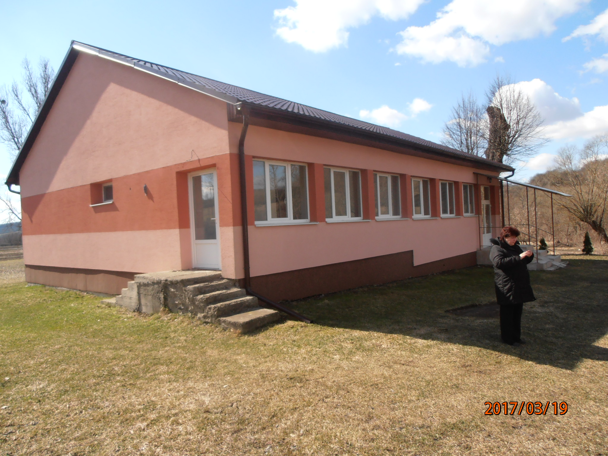 Dom smútku